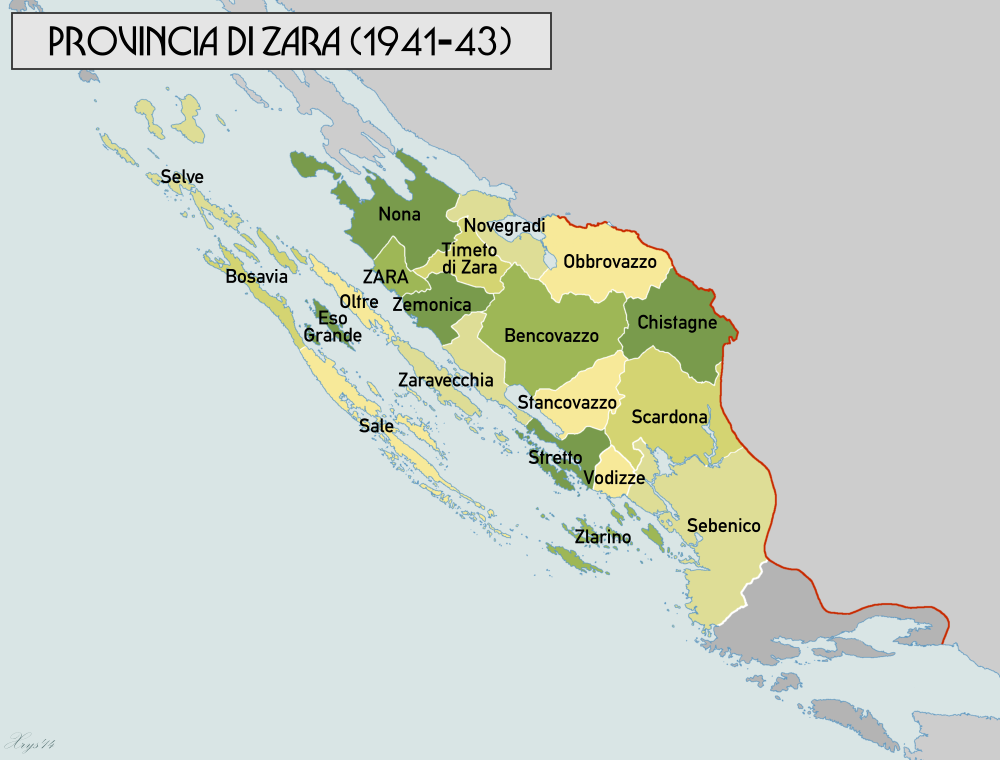 Mappa della Provincia Italiana di Zara (1941-43). Dati di origine: Volkstumskarte von Jugoslawien, Wilfried Krallert (1941)